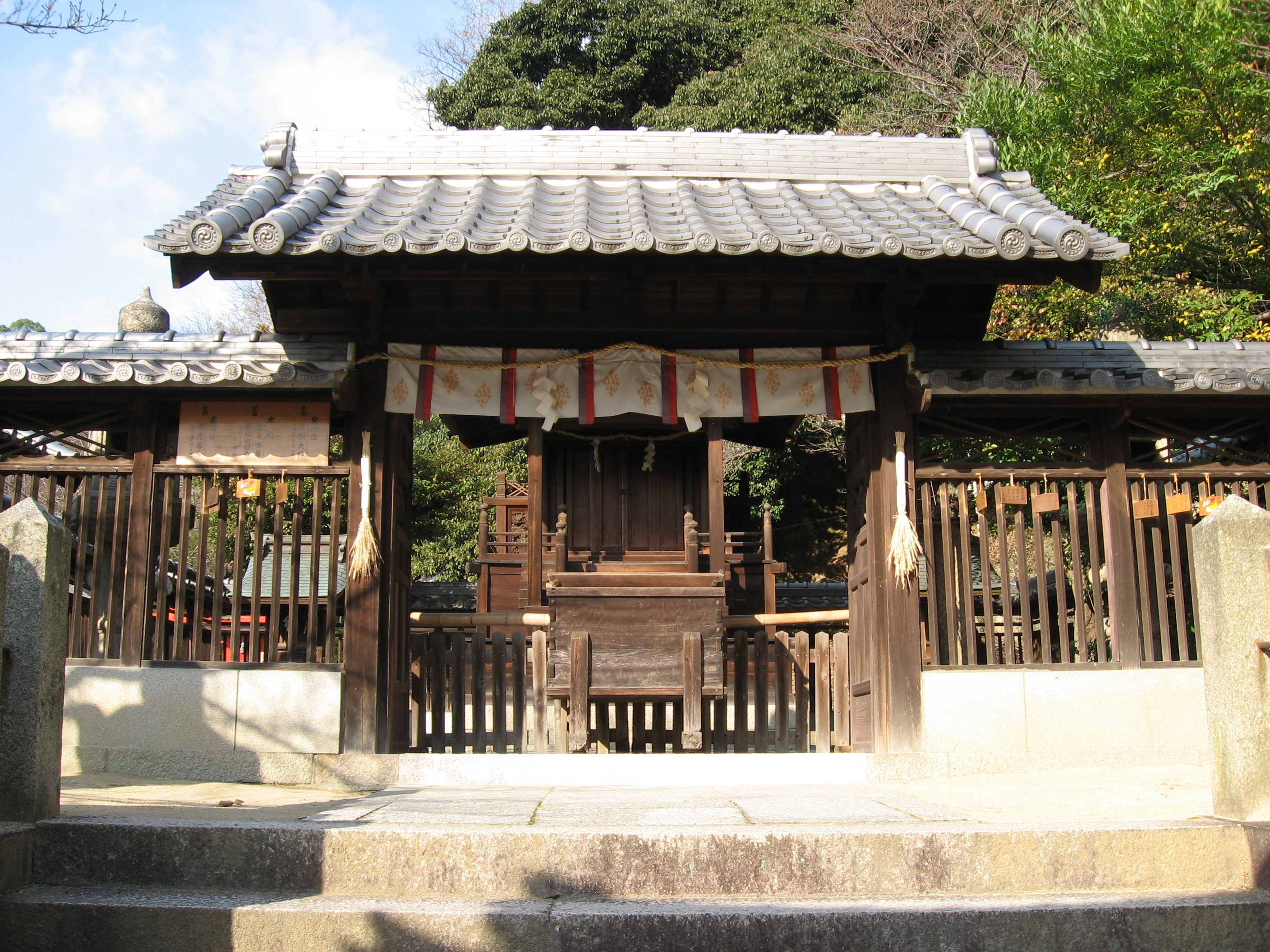 神戸 祇園神社の拝殿